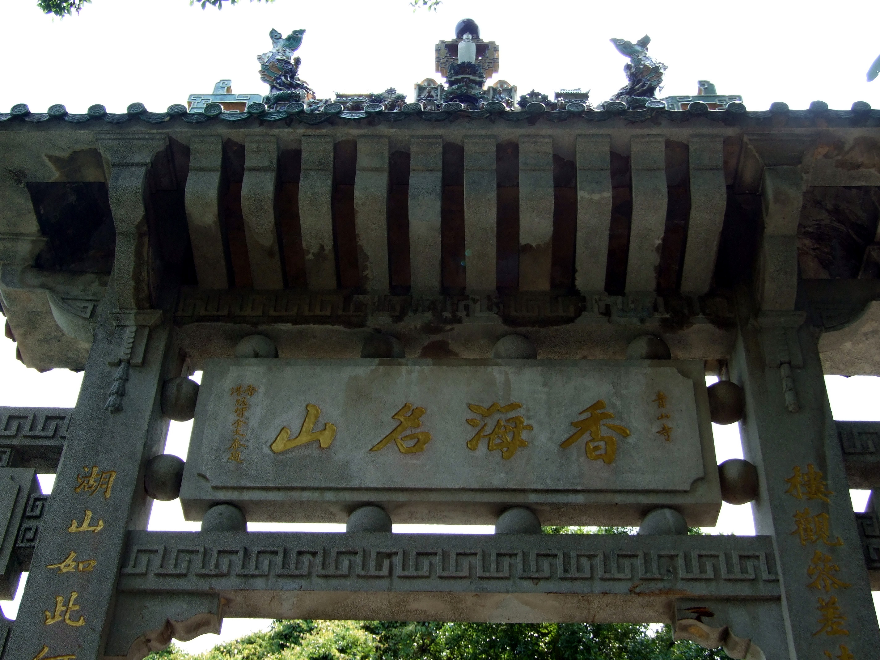 中文（香港）: 香海名山牌樓金文泰親書正面橫匾「香海名山」